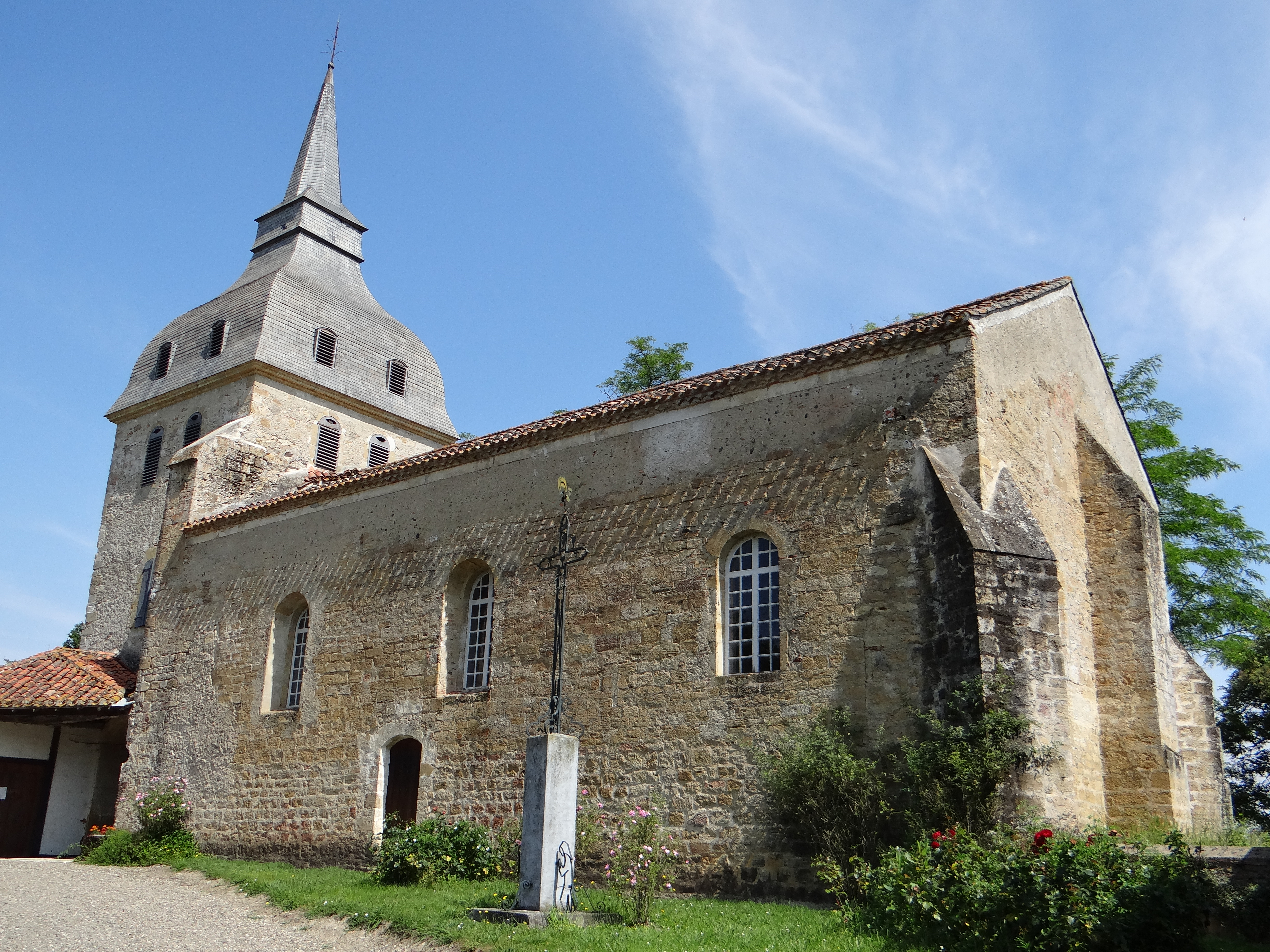 Galiax - Église Saint-Michel - Ensemble